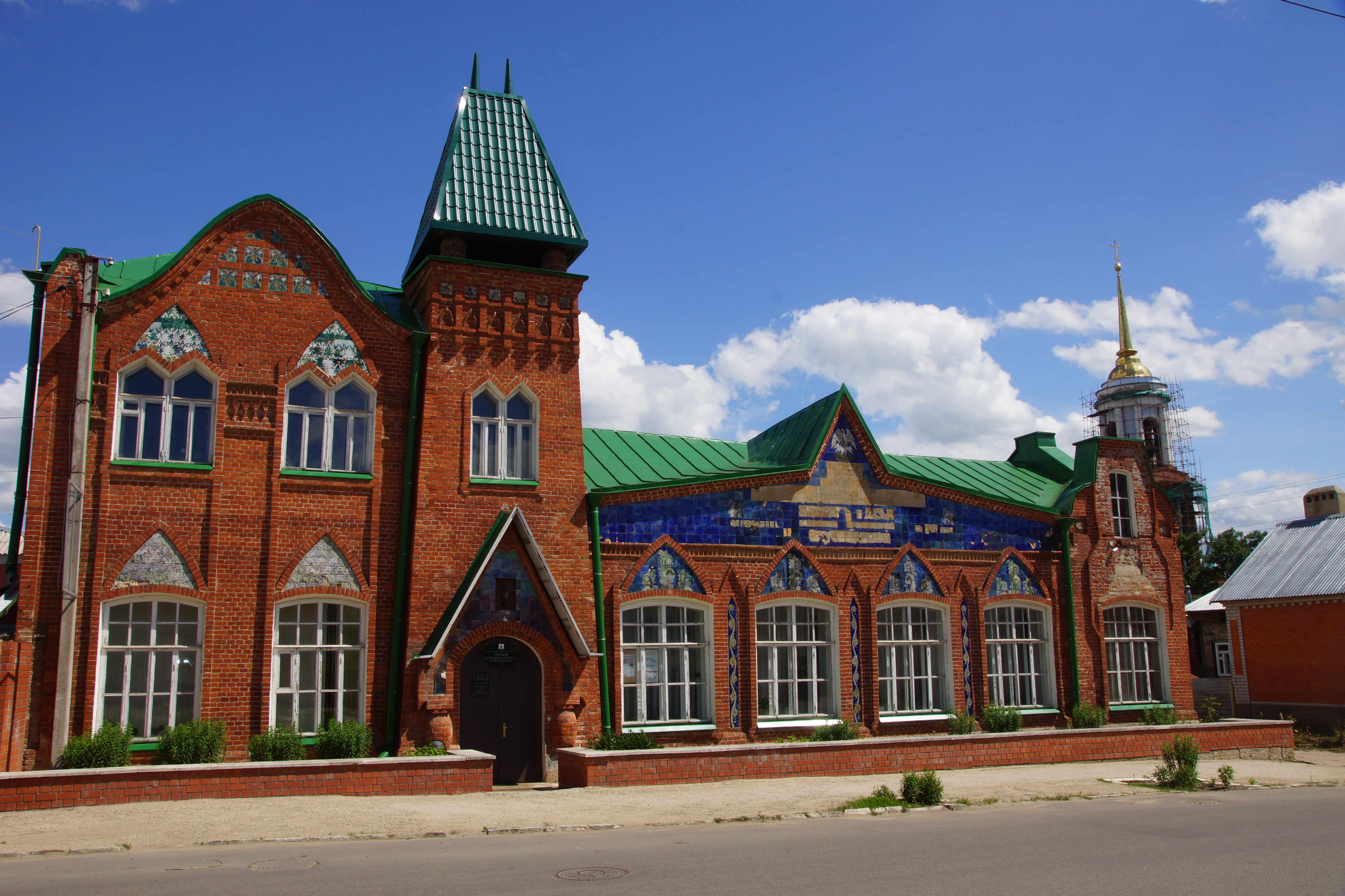 Здание детских ясель (для работниц табачной фабрики Заусайлова) (Липецкая область, Елец, улица Ленина, 68)